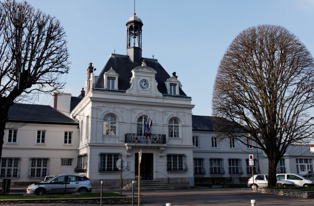 Mairie de Bry-sur-Marne